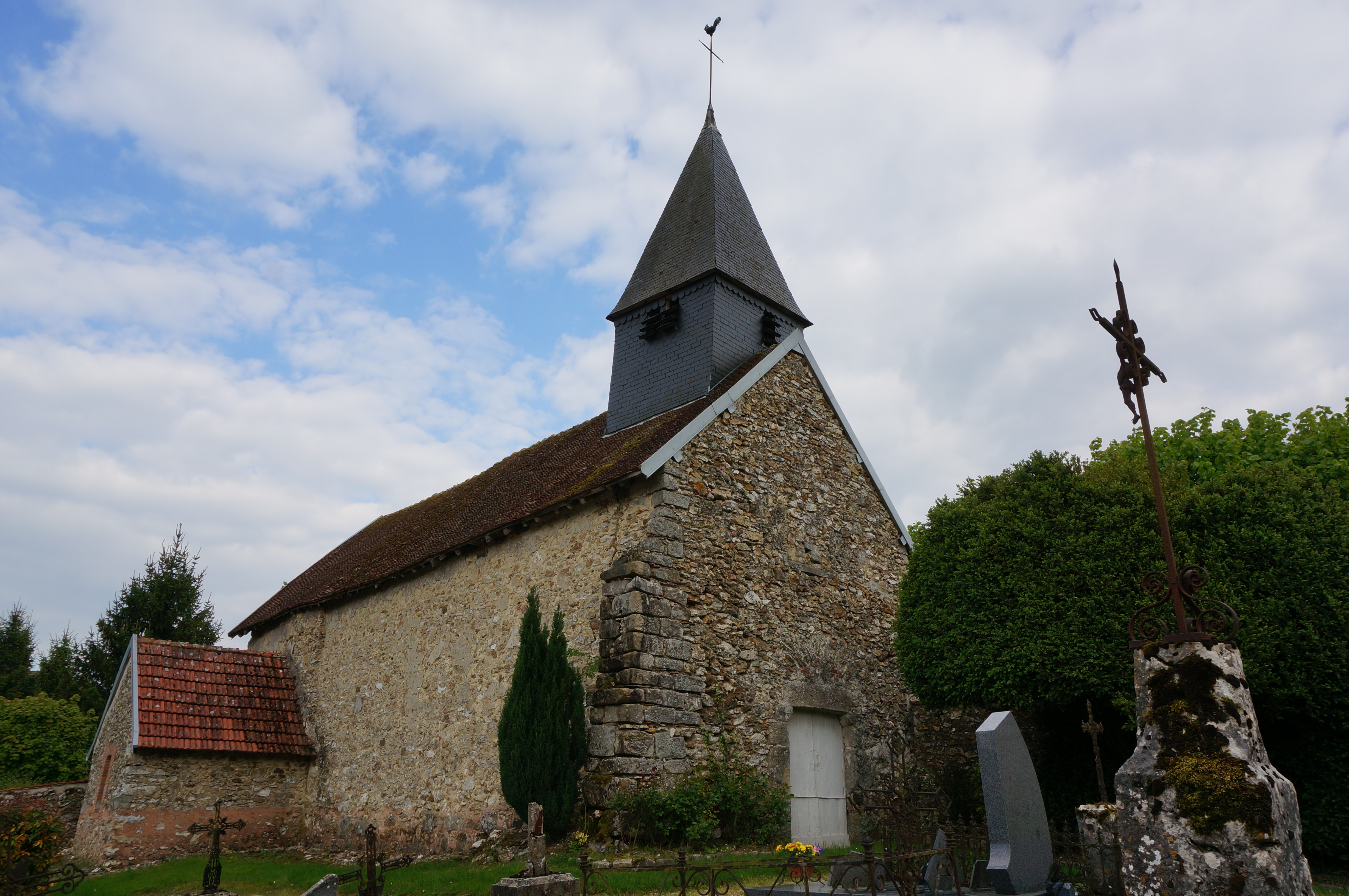 à Bannay (Marne).